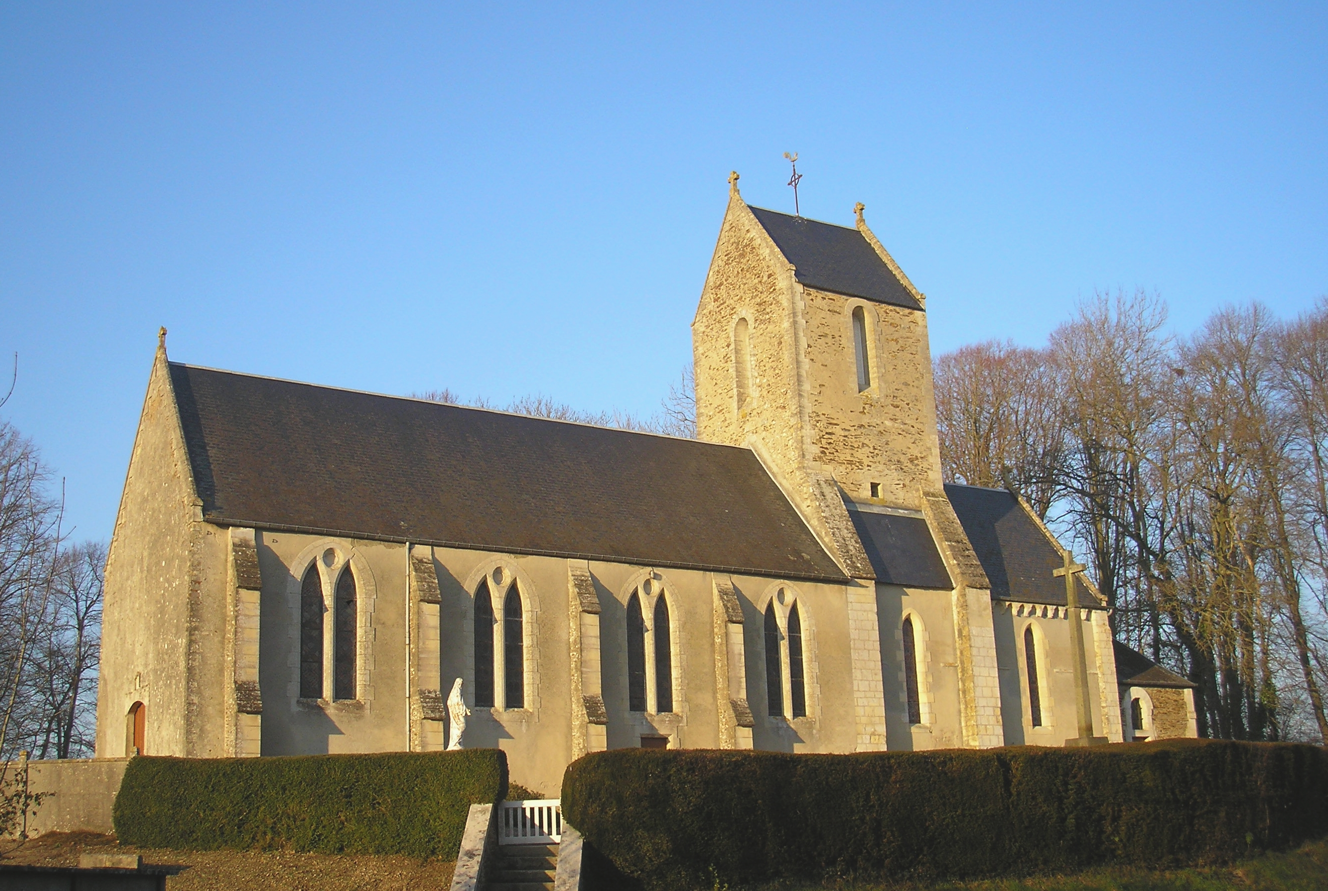 Torteval-Quesnay (Normandie, France). L'église Notre-Dame de Quesnay-Guesnon.